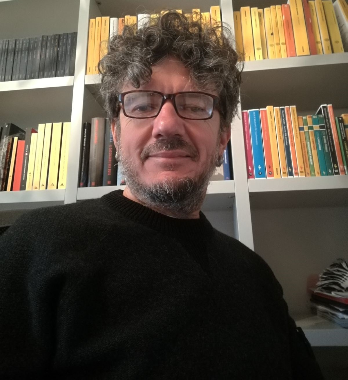 Guido Genovesi nel 2017